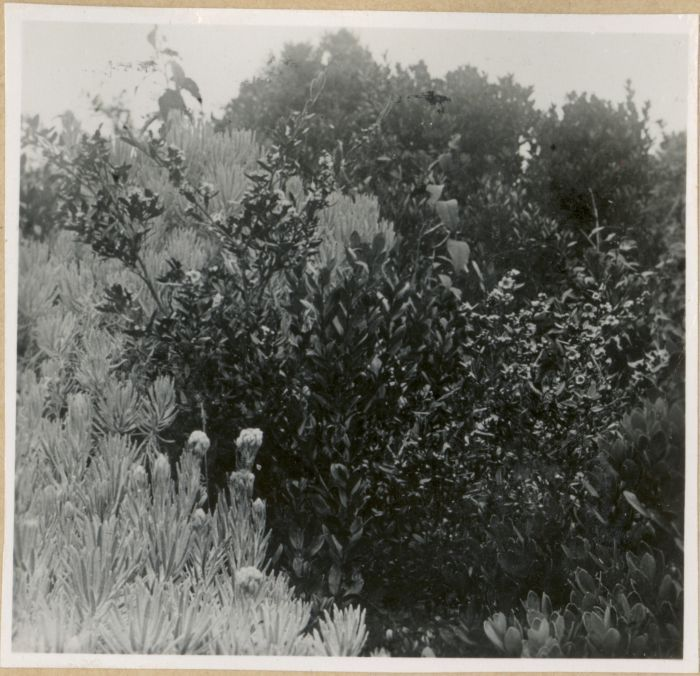 Repronegatief. Anaphalis javanica en Leptospermum javanicum op de top van de Pangerango